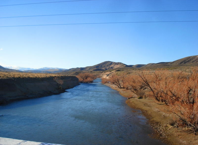 Vista derecha del río Catan Lil durante su cruce en dirección a la localidad de Las Coloradas a través de la ruta provincial 24 en la provincia del Neuquén, Argentina. Unknown